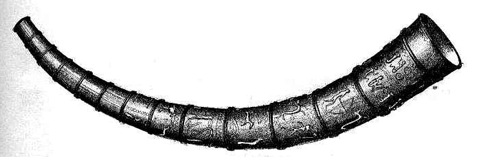 Billede af det store guldhorn. Billedet er fra